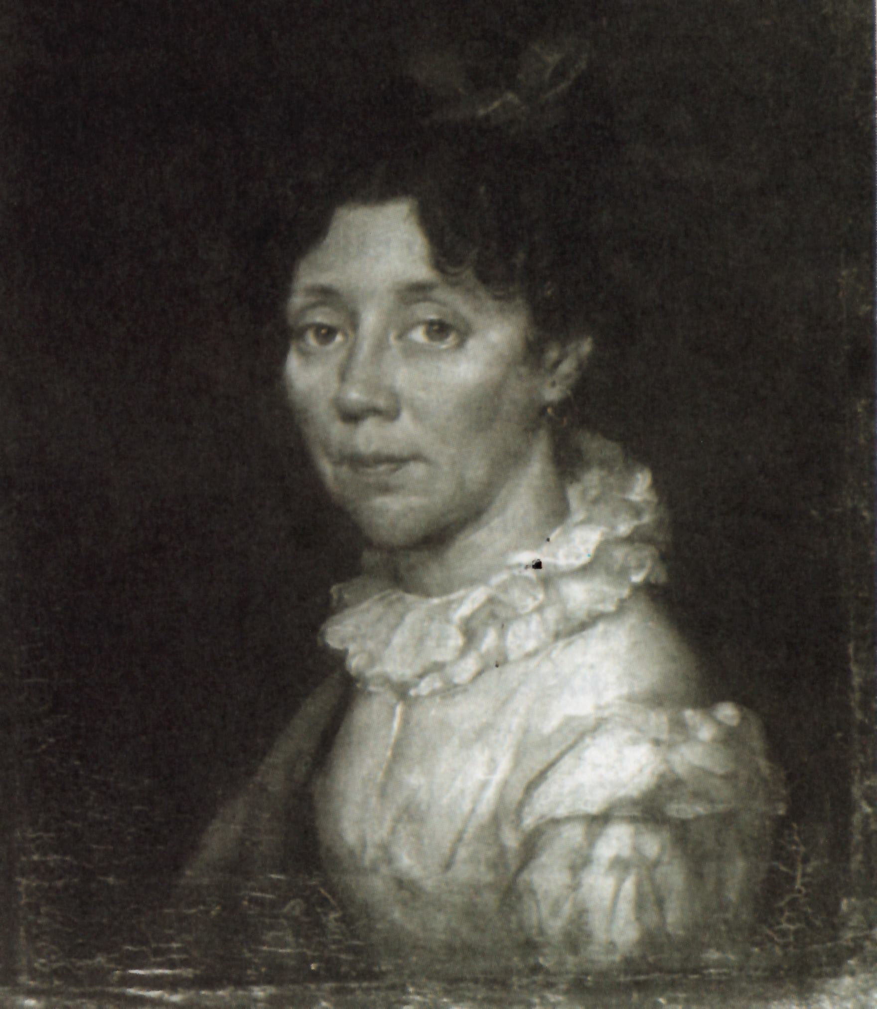 Беларуская (тарашкевіца): Партрэт Схалястыкі Ваньковіч (Schalastyka Vańkovič) з роду Гарэцкіх (Harecki), маці Валенція